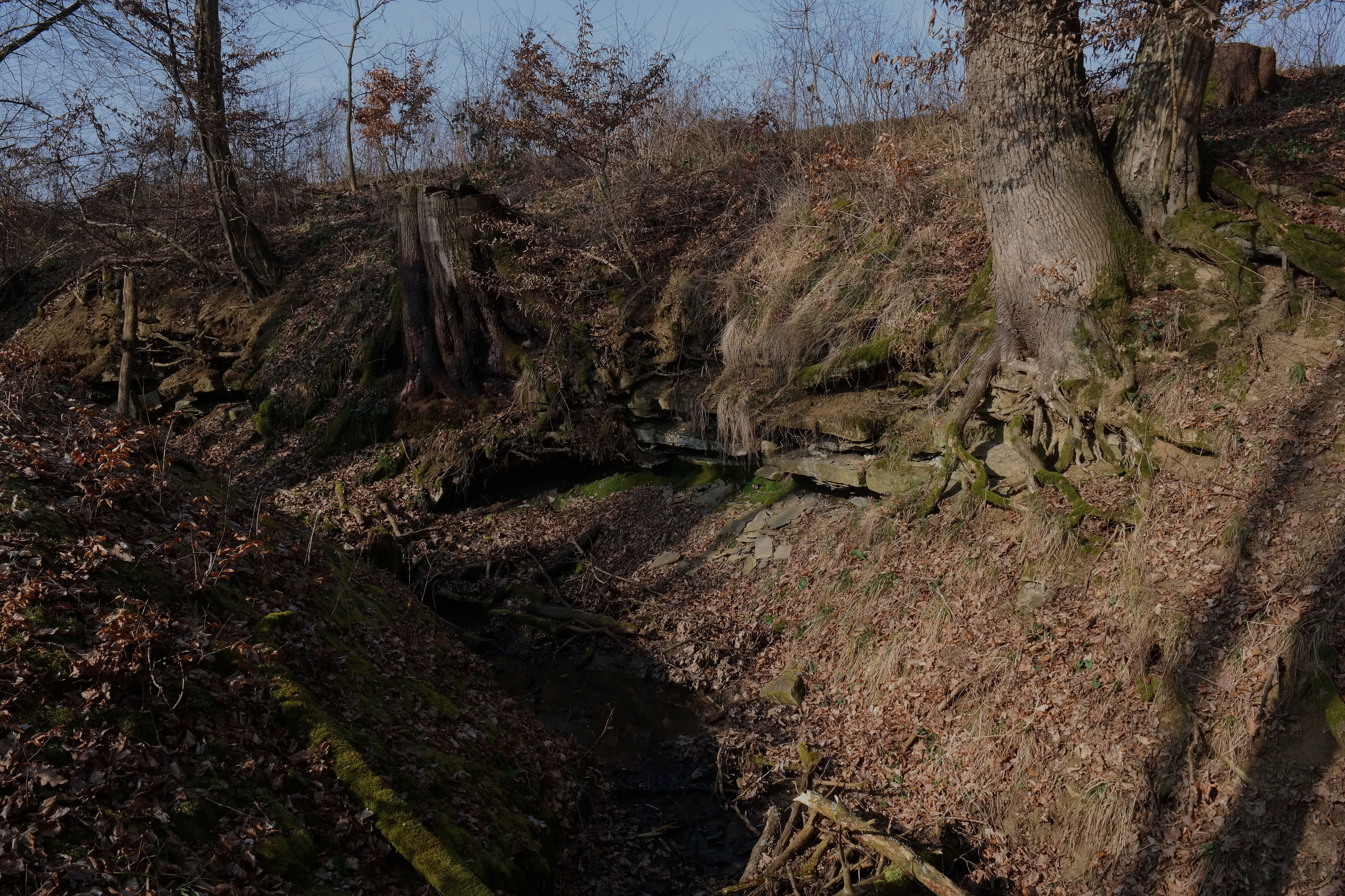 Geotop Nummer 574A017: Aufschluss im Steingraben westlich von Engelthal